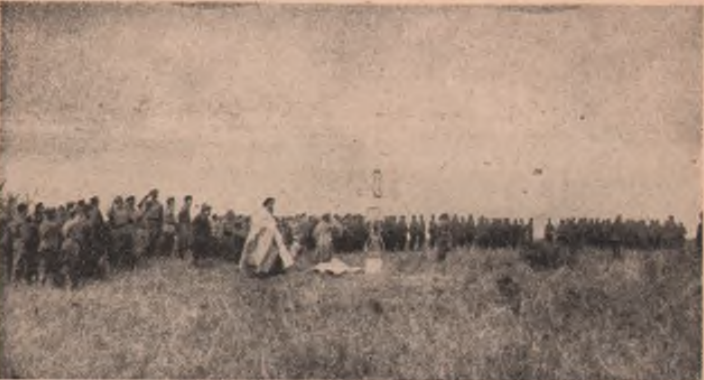 П анахида на дніпровому острові Хортипя, що її відправлено в память давніх Запоріжжі.